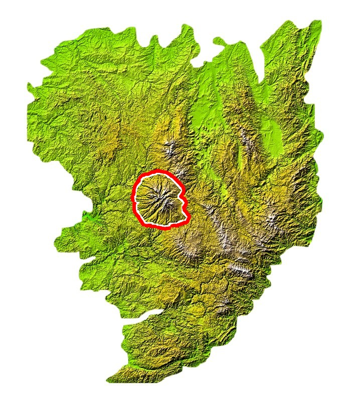 Emplacement des Monts du Cantal sur la carte du Massif Central